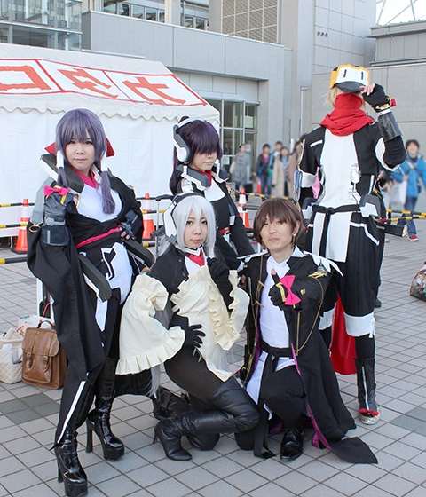 Cosplay de personajes de Kyōkai Senjō no Horizon.